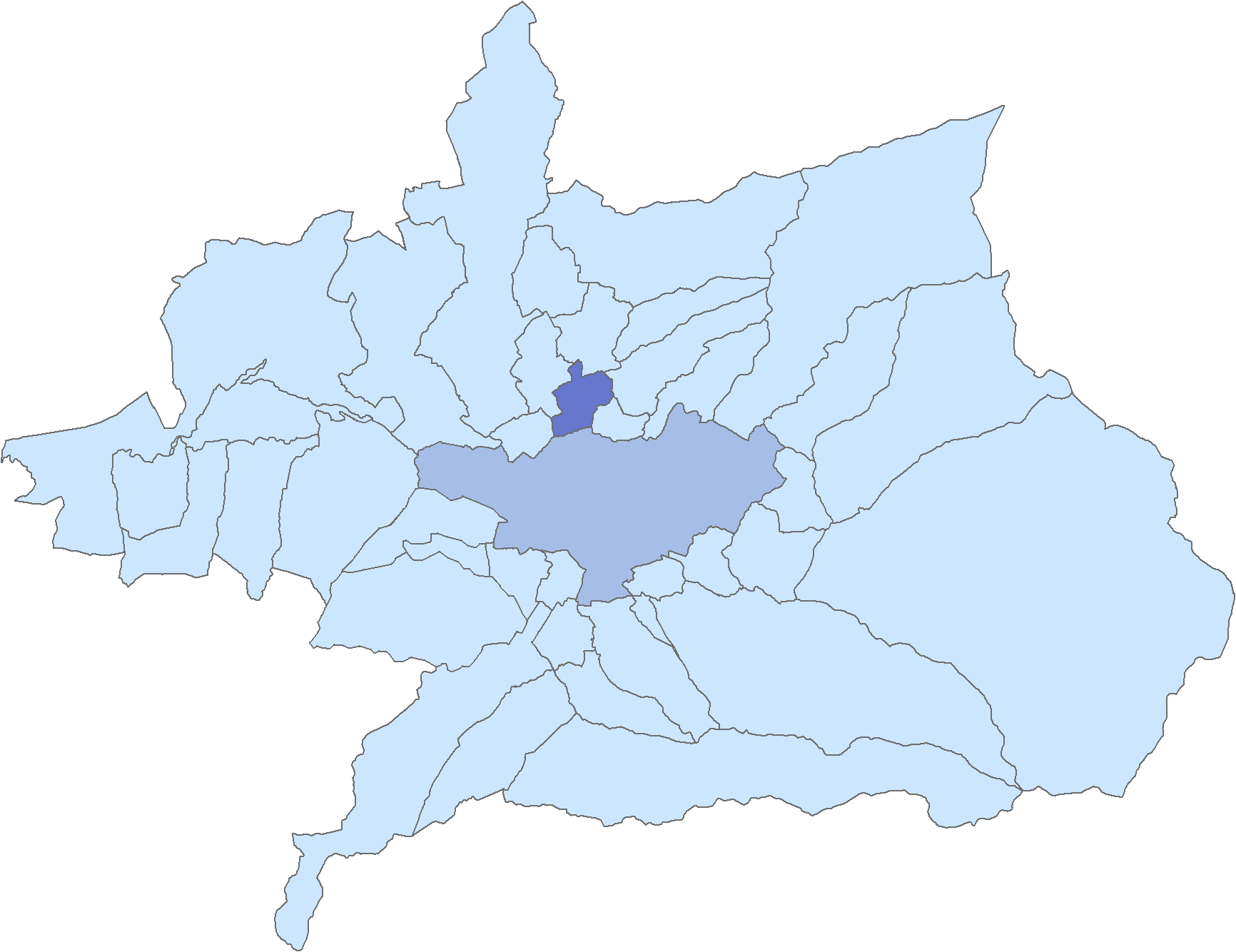 Situación del municipio de Pulianas respecto a la comarca de la Vega de Granada, en España.